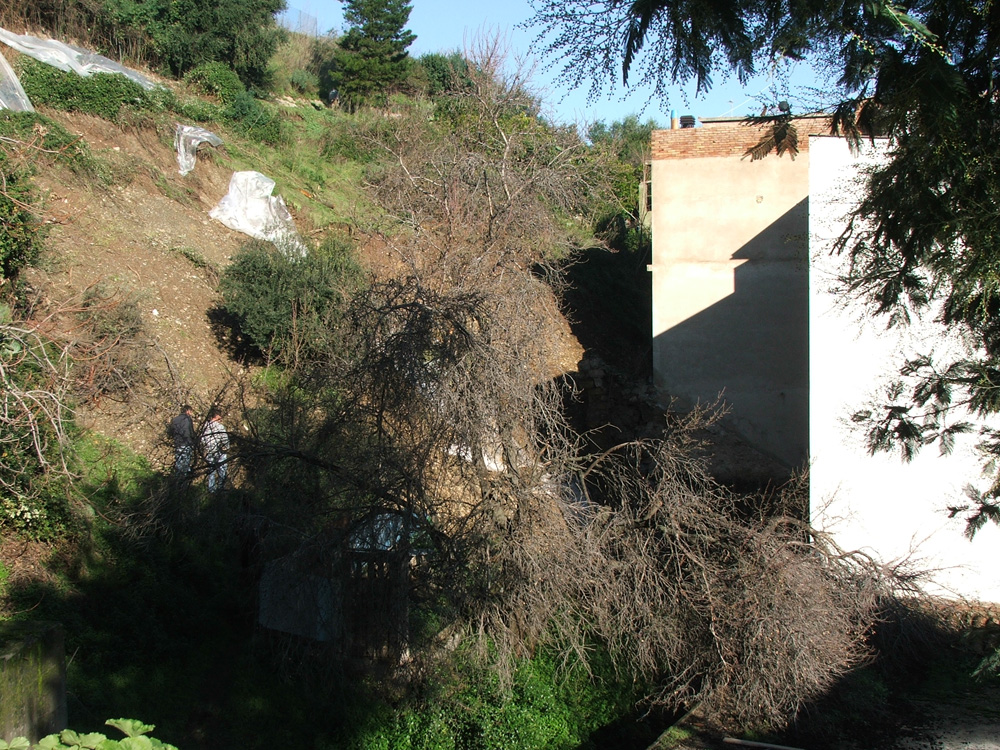 Smottamento